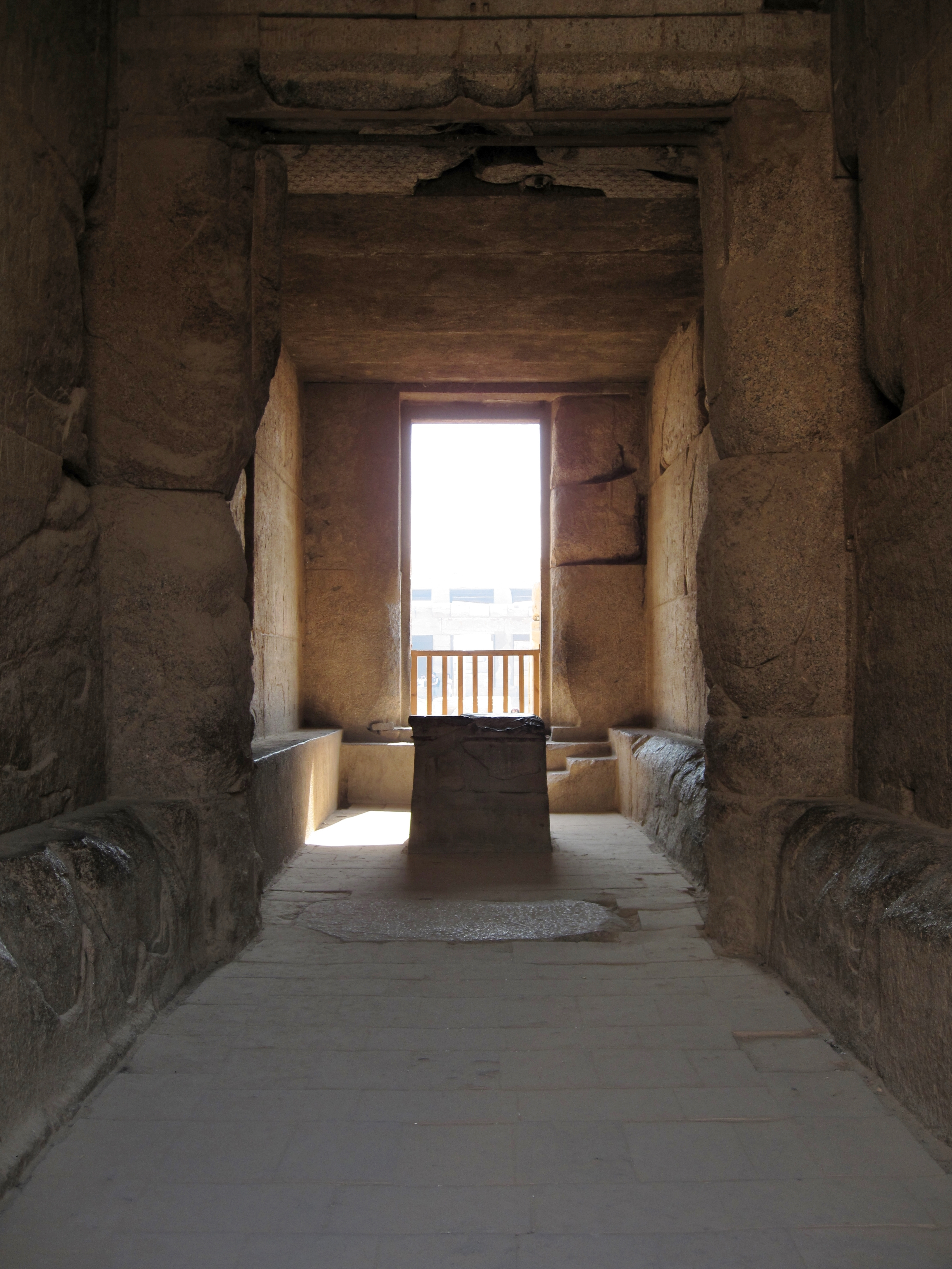 Barkenkapelle des Philipp III. Arrhidaios im Tempel von Karnak, nördlich von Luxor, Ägypten